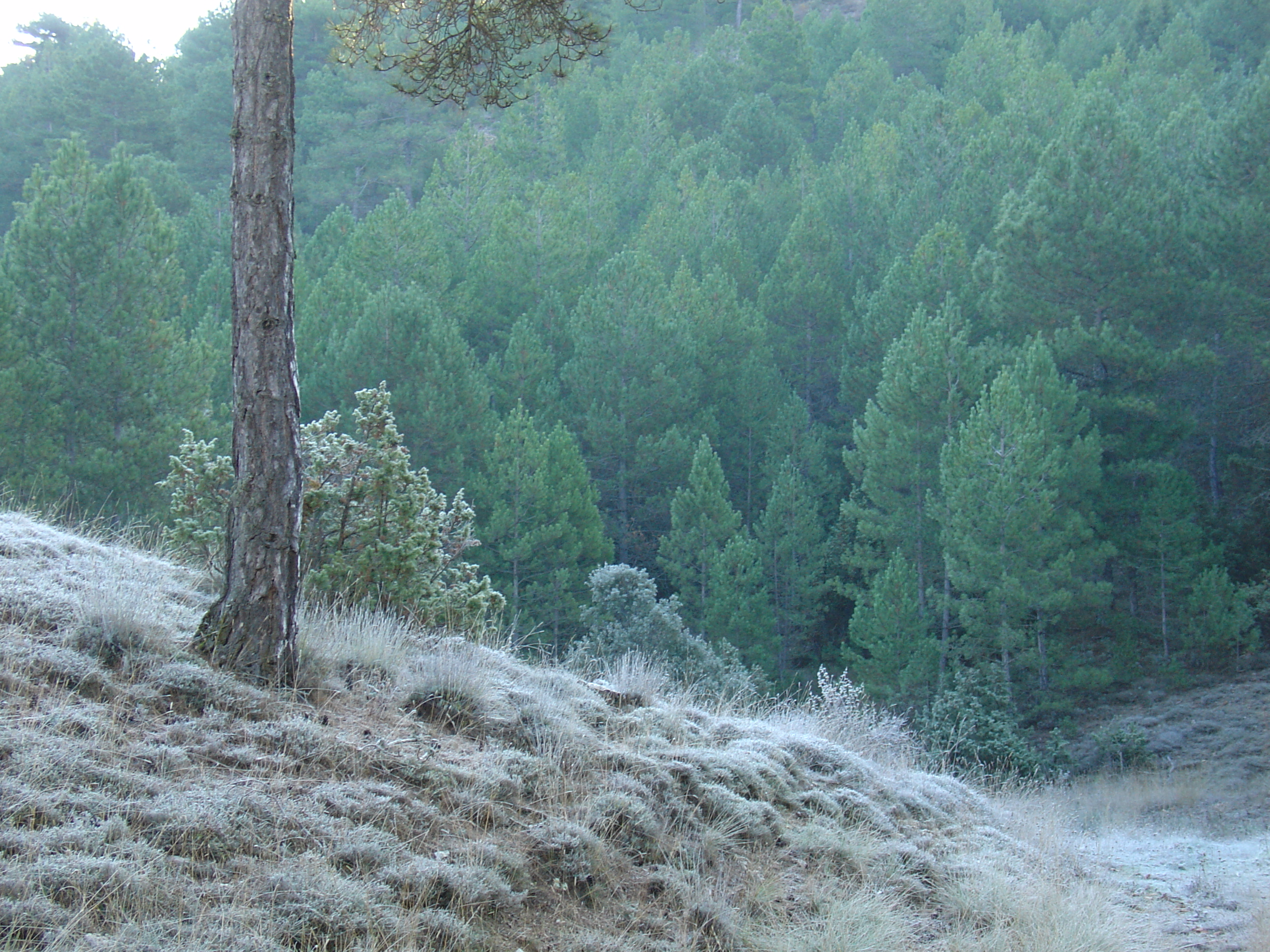 Paisaje de la Sierra de Valdemeca, Cuenca, España